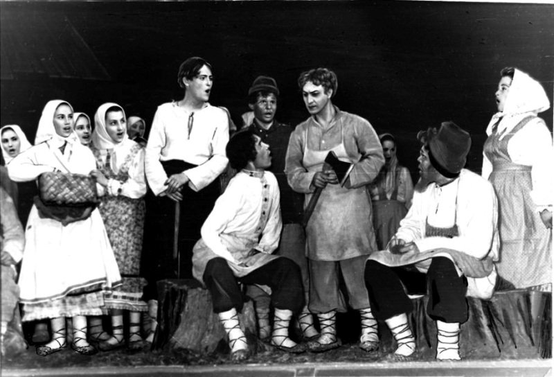 описание